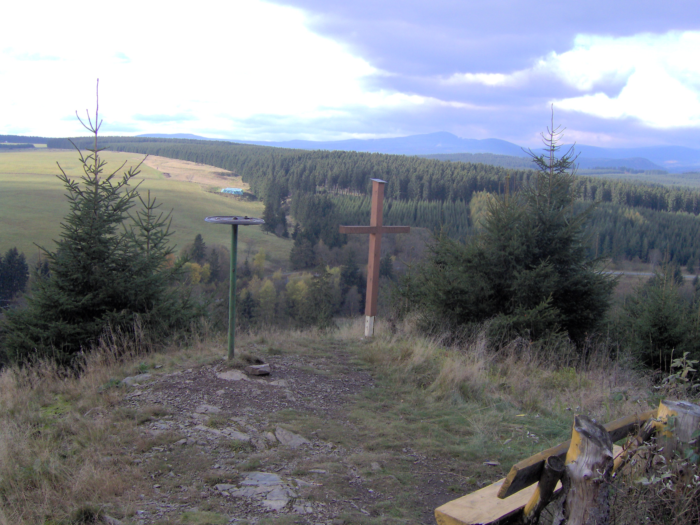 Aussichtspunkt (ca. ; etwa 750 m westlich vom Berggipfel) am Kapitelsberg; mit Wurmberg (mittig) und Brocken (rechts)